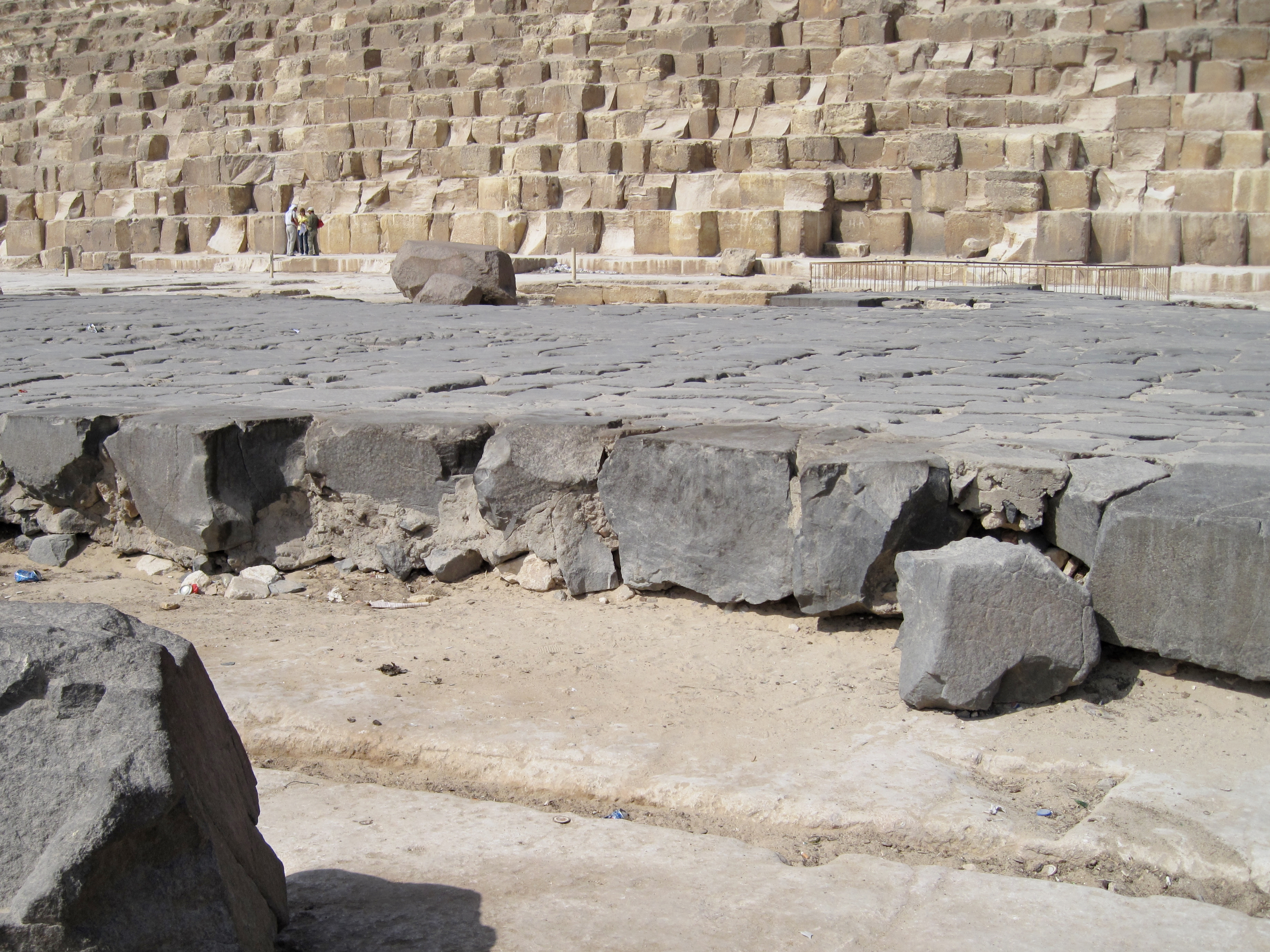 Ostseite der Cheops-Pyramide auf dem Giseh-Plateau bei Kairo, Ägypten